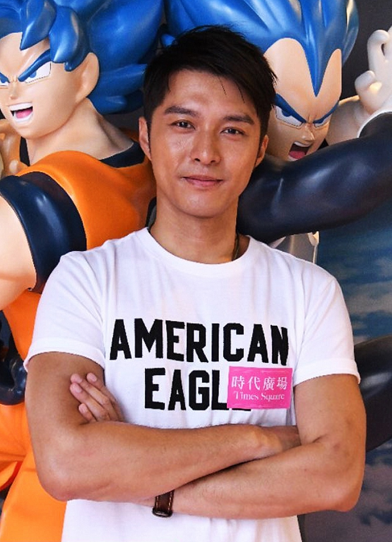 參觀「Dragonball World Adventure」全球巡展 - 香港站